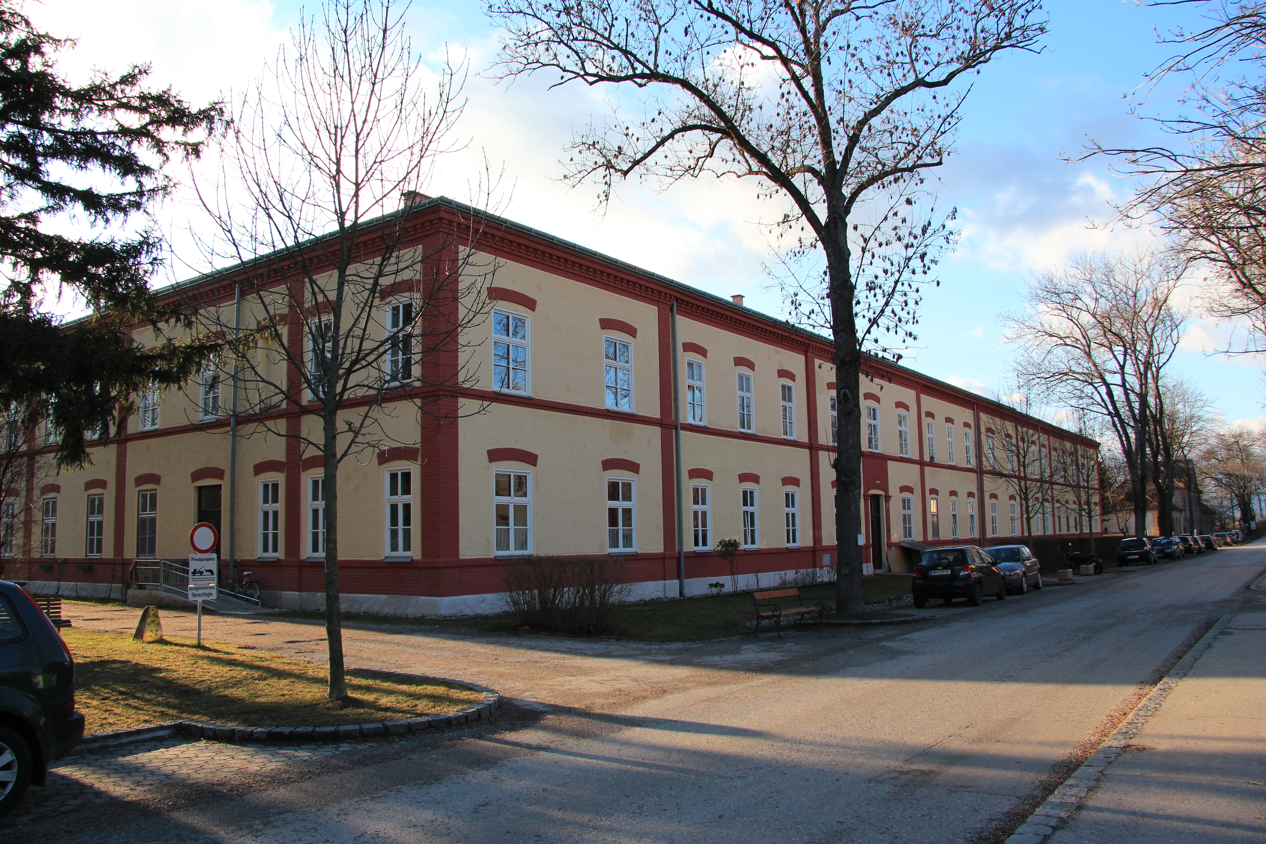 Blumau Kasinostraße 1, Arbeiter/Angestelltenwohnhaus